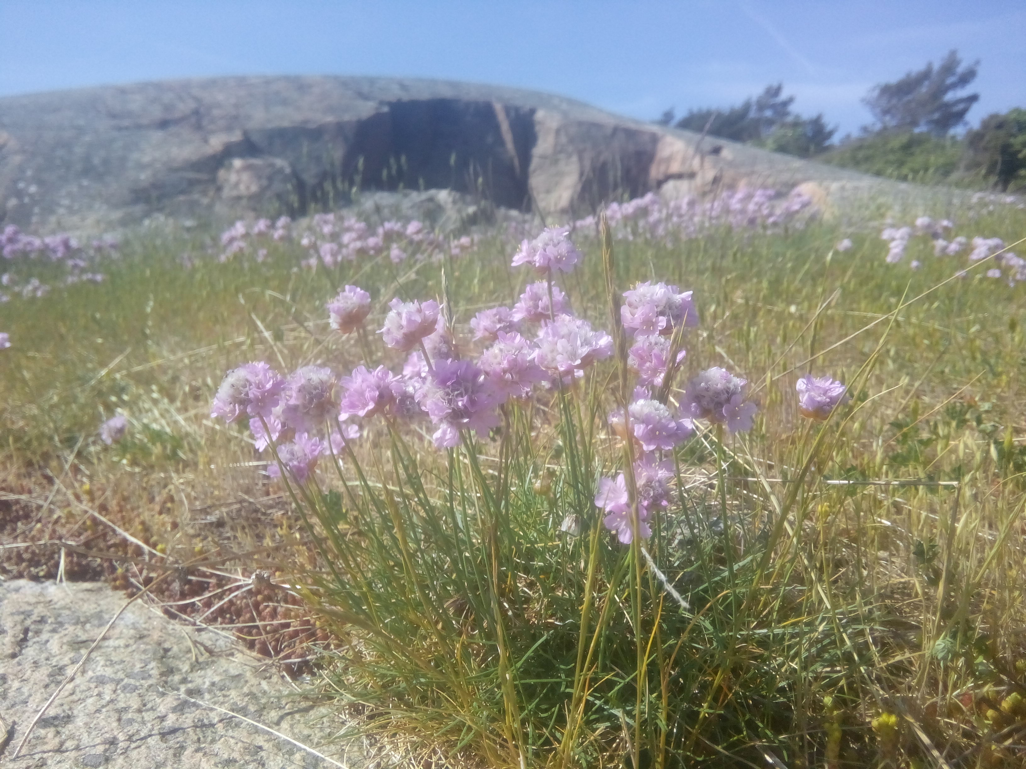 Blommor i Svanviks naturreservat på Orust.